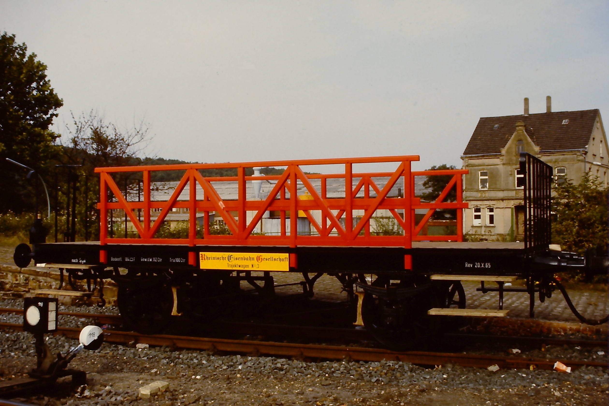 Rheinische Eisenbahn-Gesellschaft (Trajektwagen Nr. 3), ausgestellt auf der Fahrzeugschau 150 Jahre deutsche Eisenbahn in Bochum-Dahlhausen